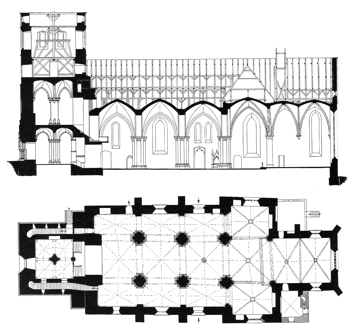 Grundriß und Längsschnitt der Propsteikirche in Brilon, vom Anfang des 20. Jahrhunderts